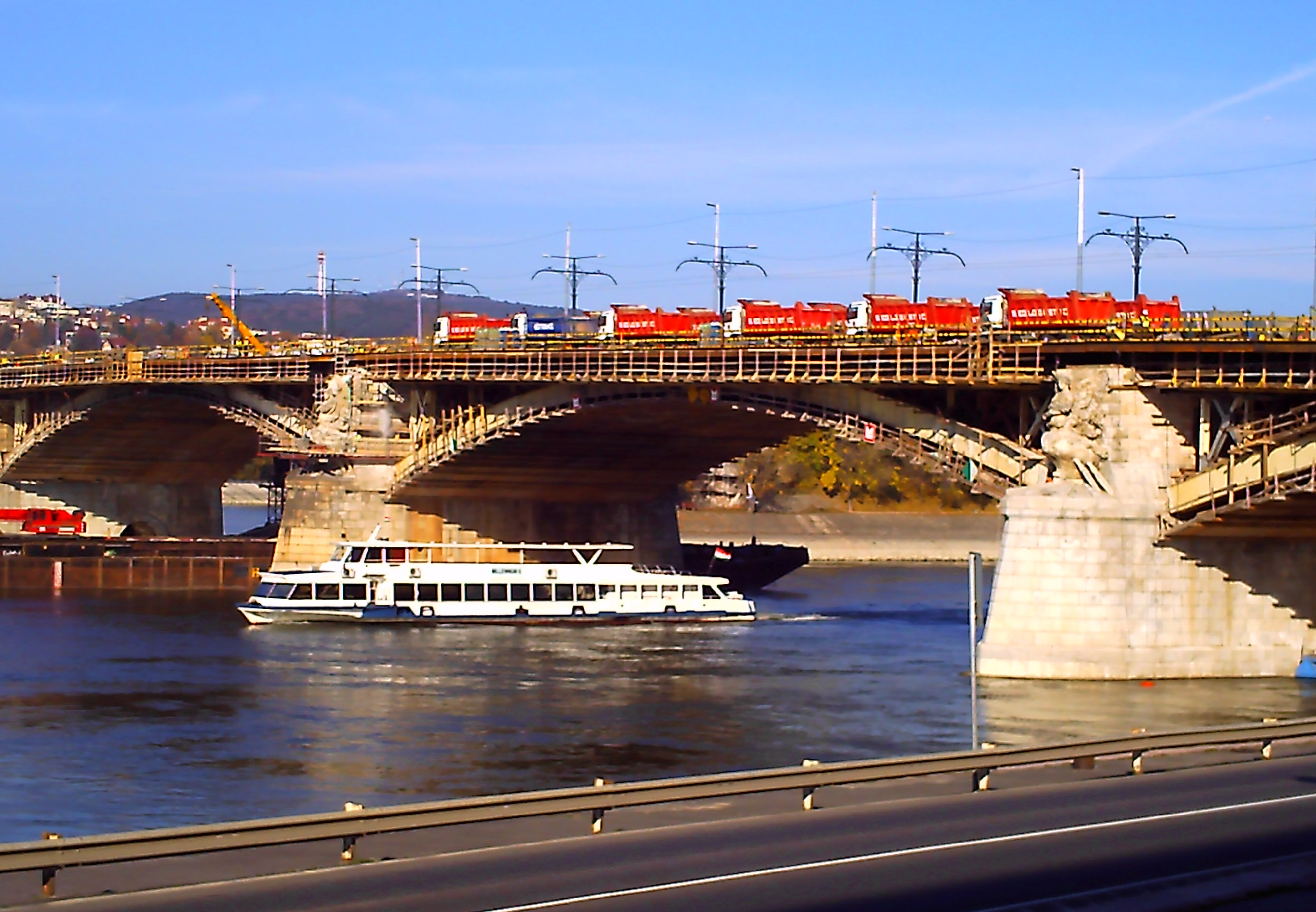 A Margit-híd terhelési próbájának kezdete (?) 2010. 11. 05-én (Budapest)